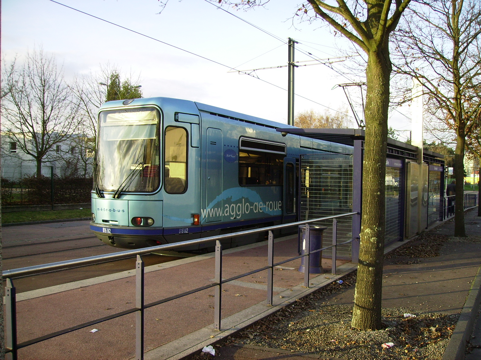 Le métrobus de l'agglomération de Rouen à l'arrêt Technopôle.